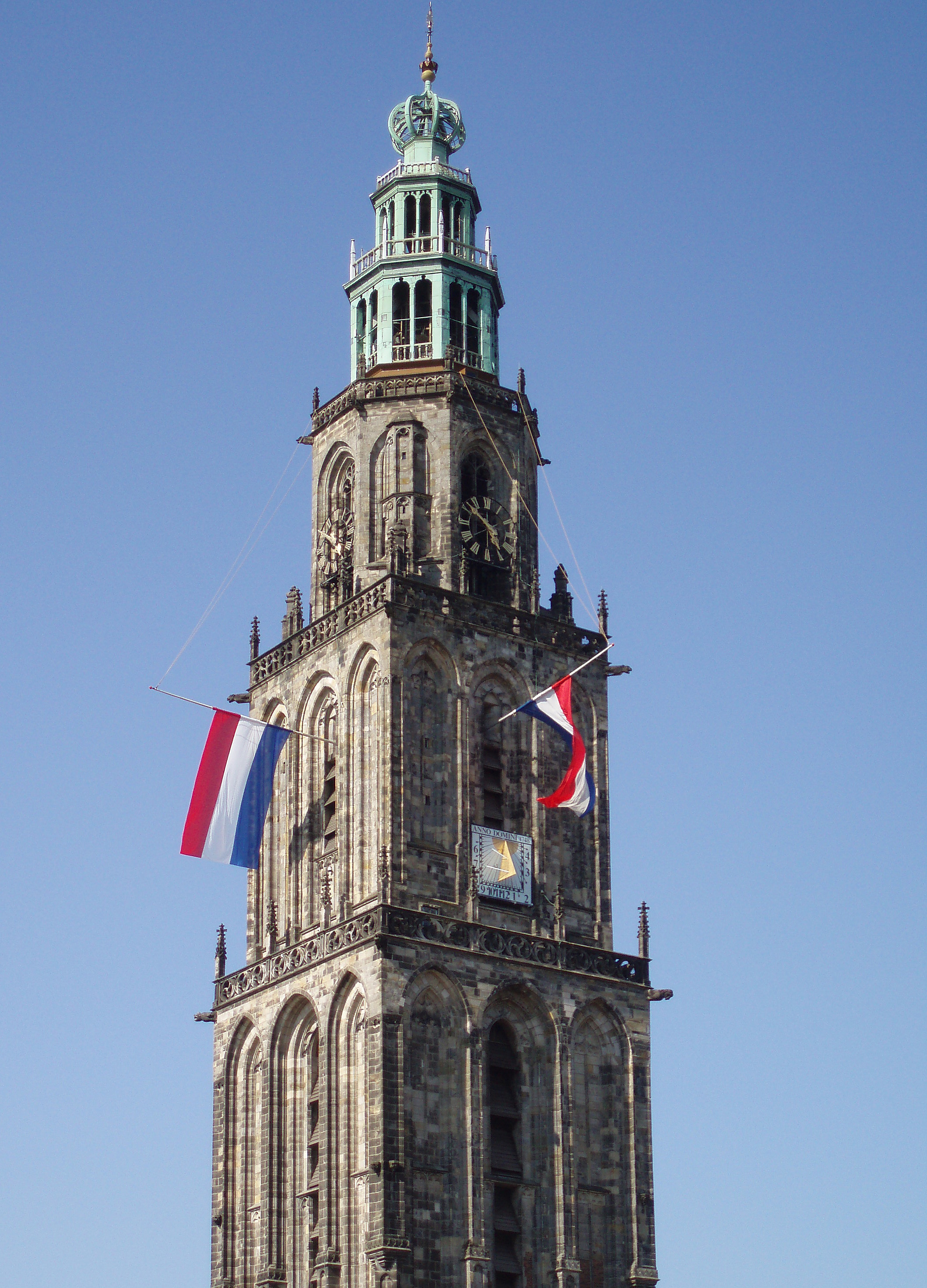 De Martinitoren in Groningen tijdens dodenherdenking op 4 mei 2007.